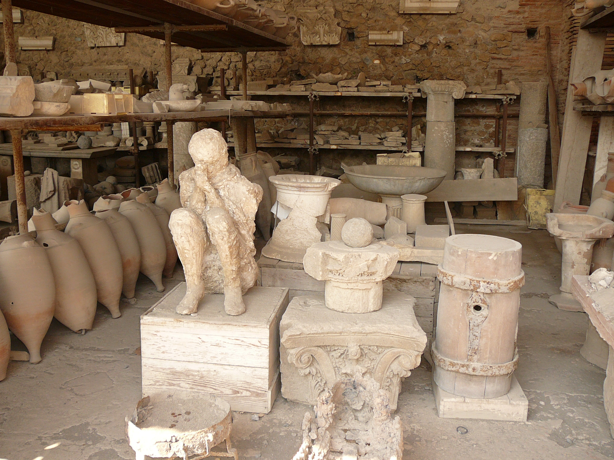 Pompei - Italy